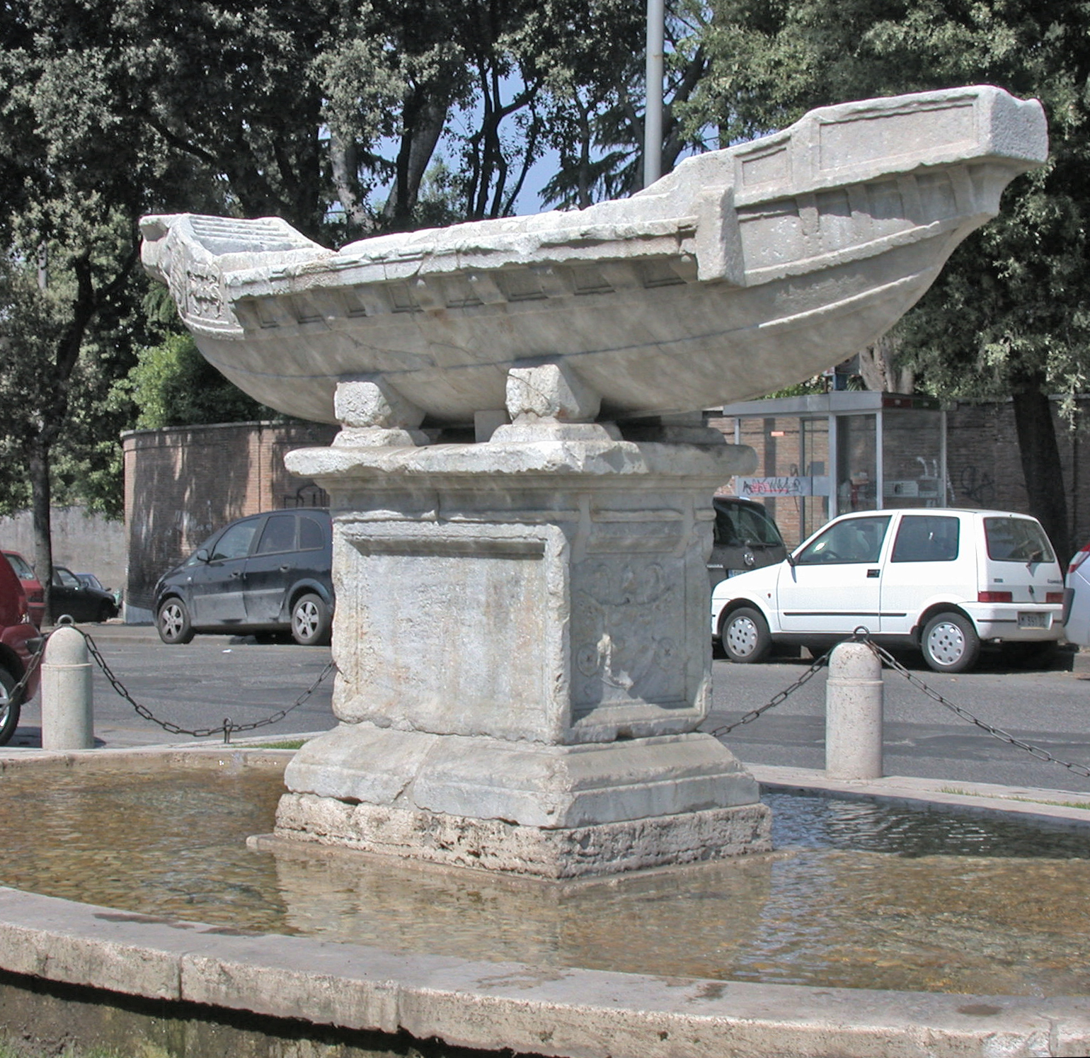 Roma, fontana della Navicella (Celio, davanti la chiesa di Santa Maria in Domnica)